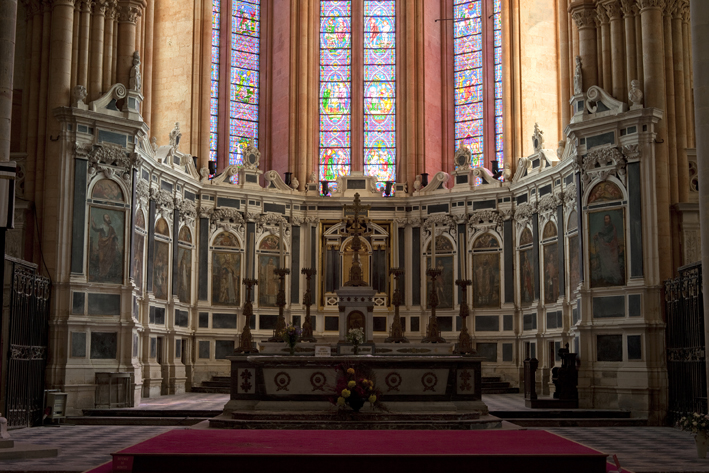 Toul (Meurthe-et-Moselle, France), cathédrale St Étienne, maître-autel en marbre polychrome avec sa garniture, de style néo-classique, et à l'arrière retable et ses 16 toiles, le tout classé M.H..